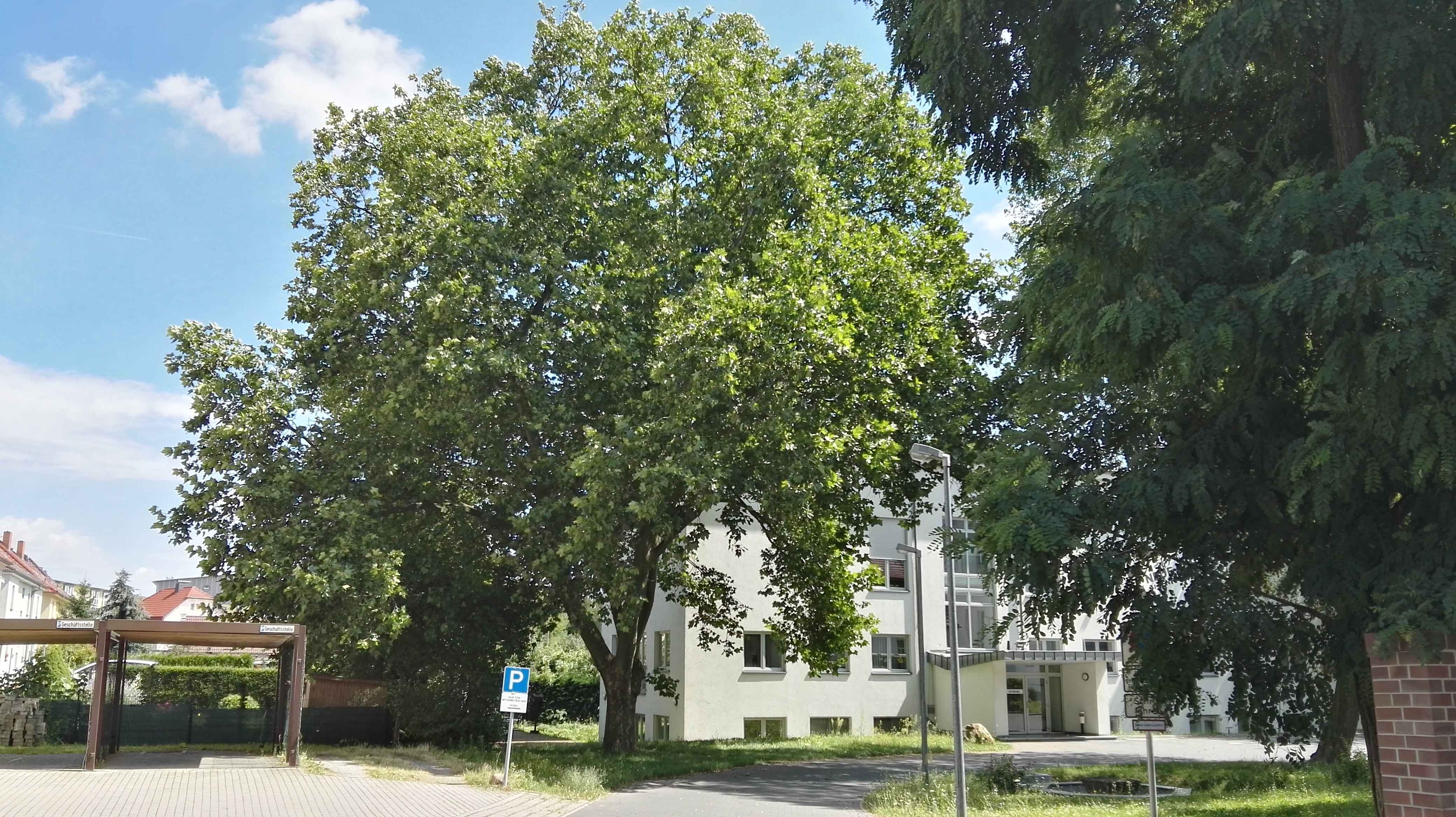 Naturdenkmal in Senftenberg Nr. 0100-3; Platane (Platanus x hispanica) auf dem Gelände der Studiobühne